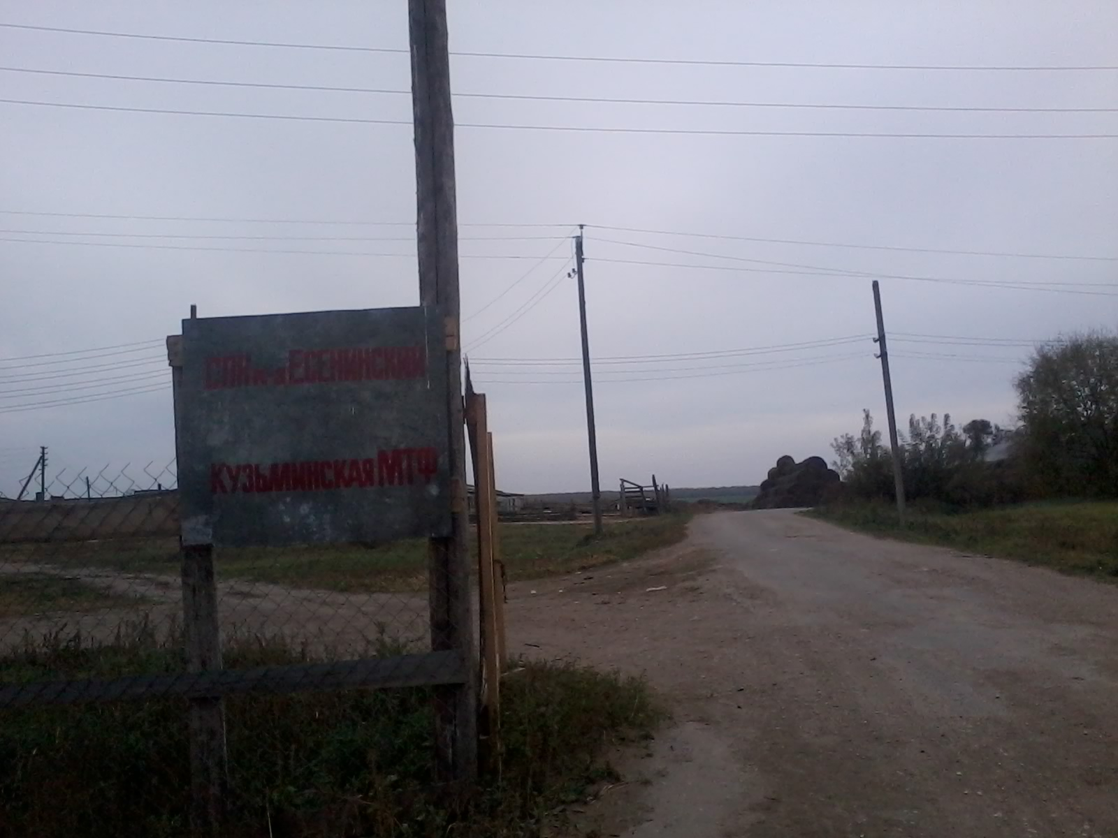 СНК